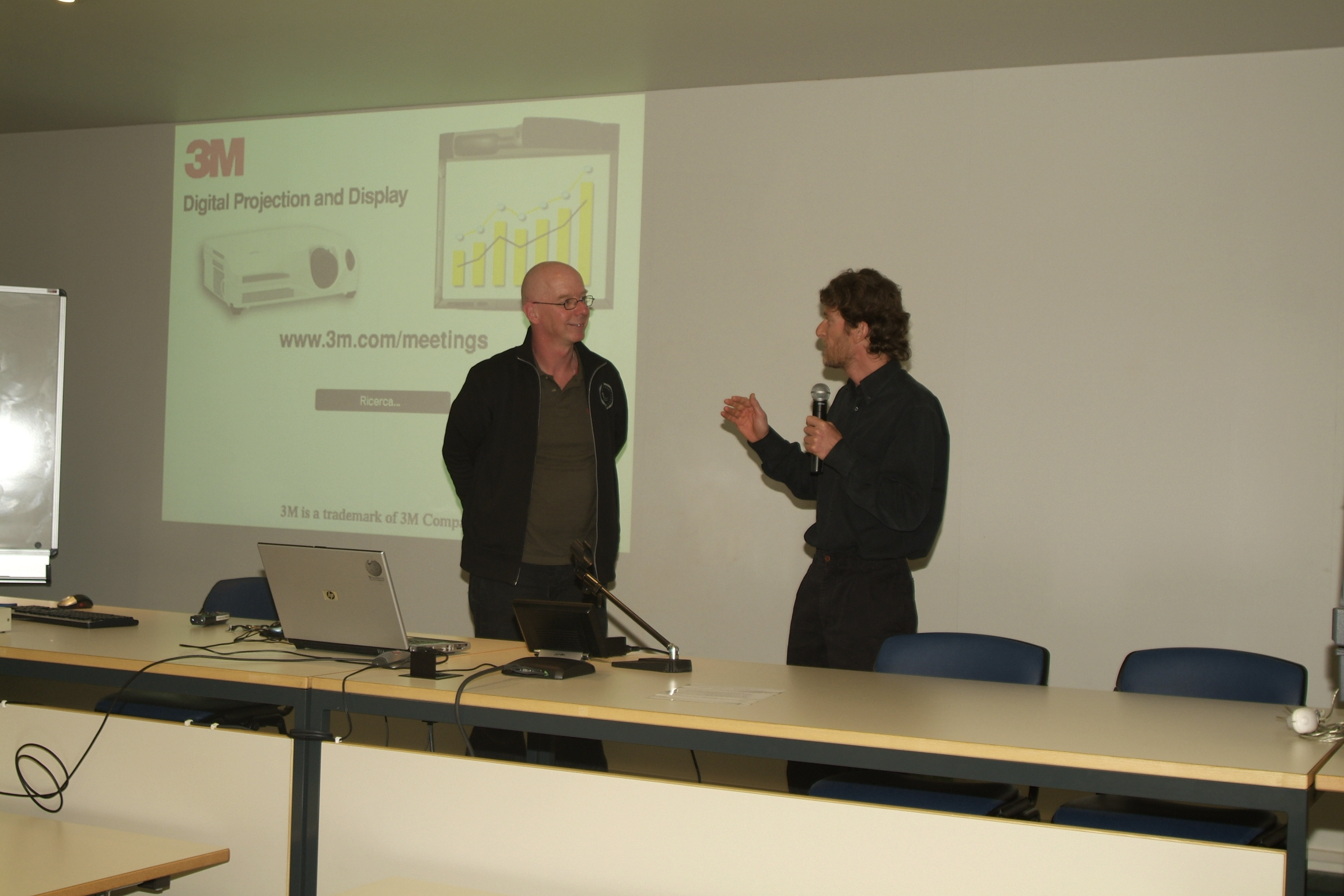 Oscar and Lorenzo